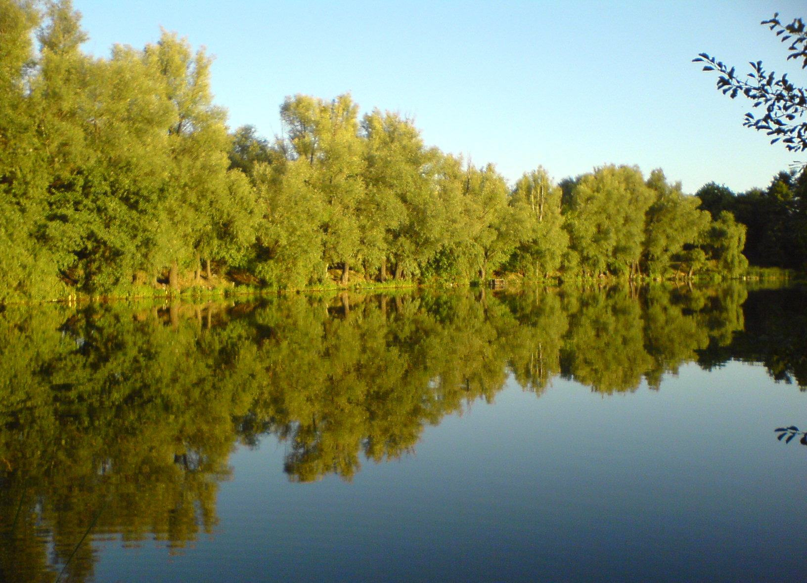 Пруд Перекошка (современное название) в Люботине, Харьковская область. Пруд находился в имении профессора Харьковского университета Владимира Порай-Кошиц, в советское время его название местные жители переделали "по-домашнему"